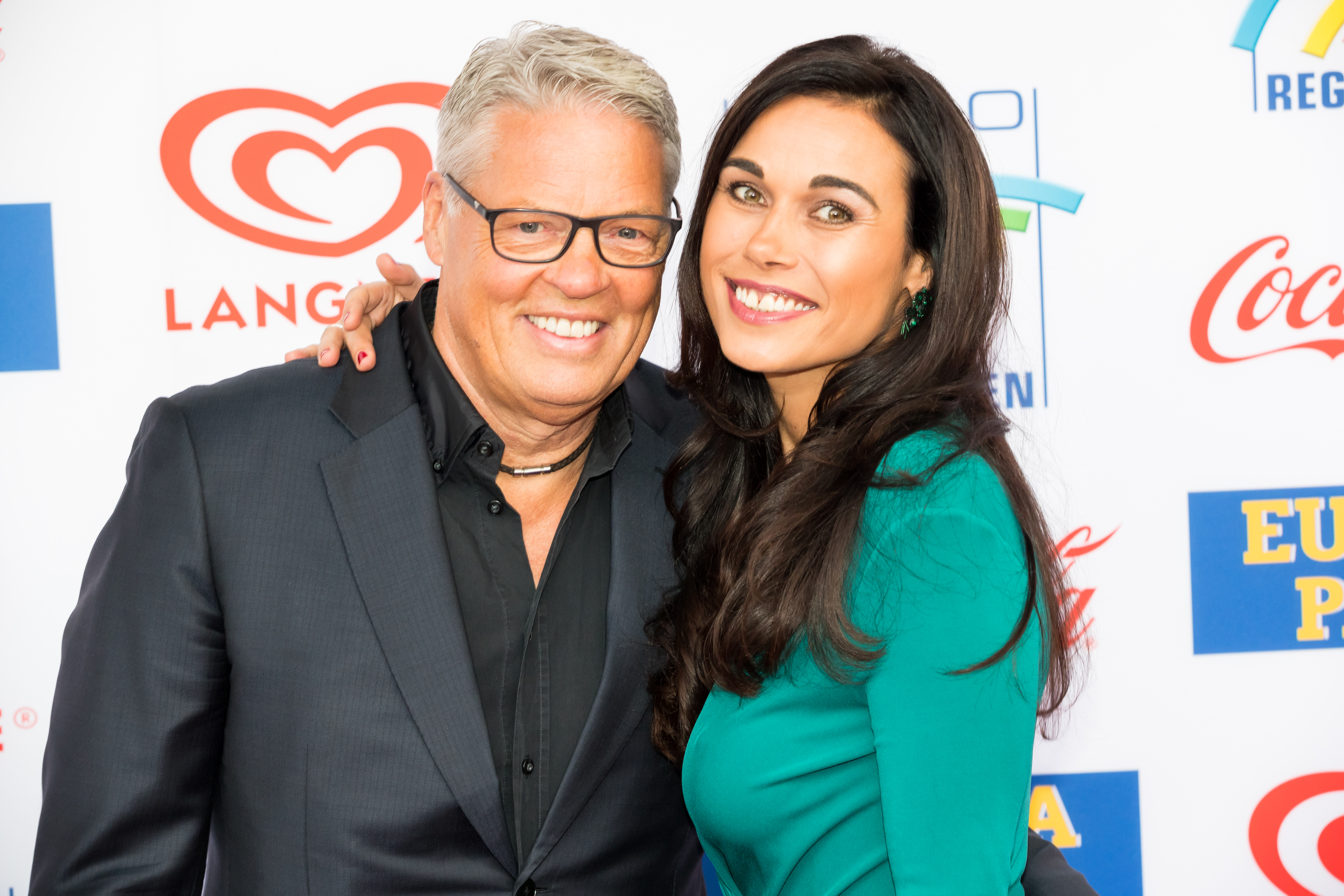 Ella Kamps, Heiner Kamps during Radio Regenbogen Award 2019 at Europapark, Rust, Baden-Württemberg, Germany on 2019-04-12, Photo: Sven Mandel